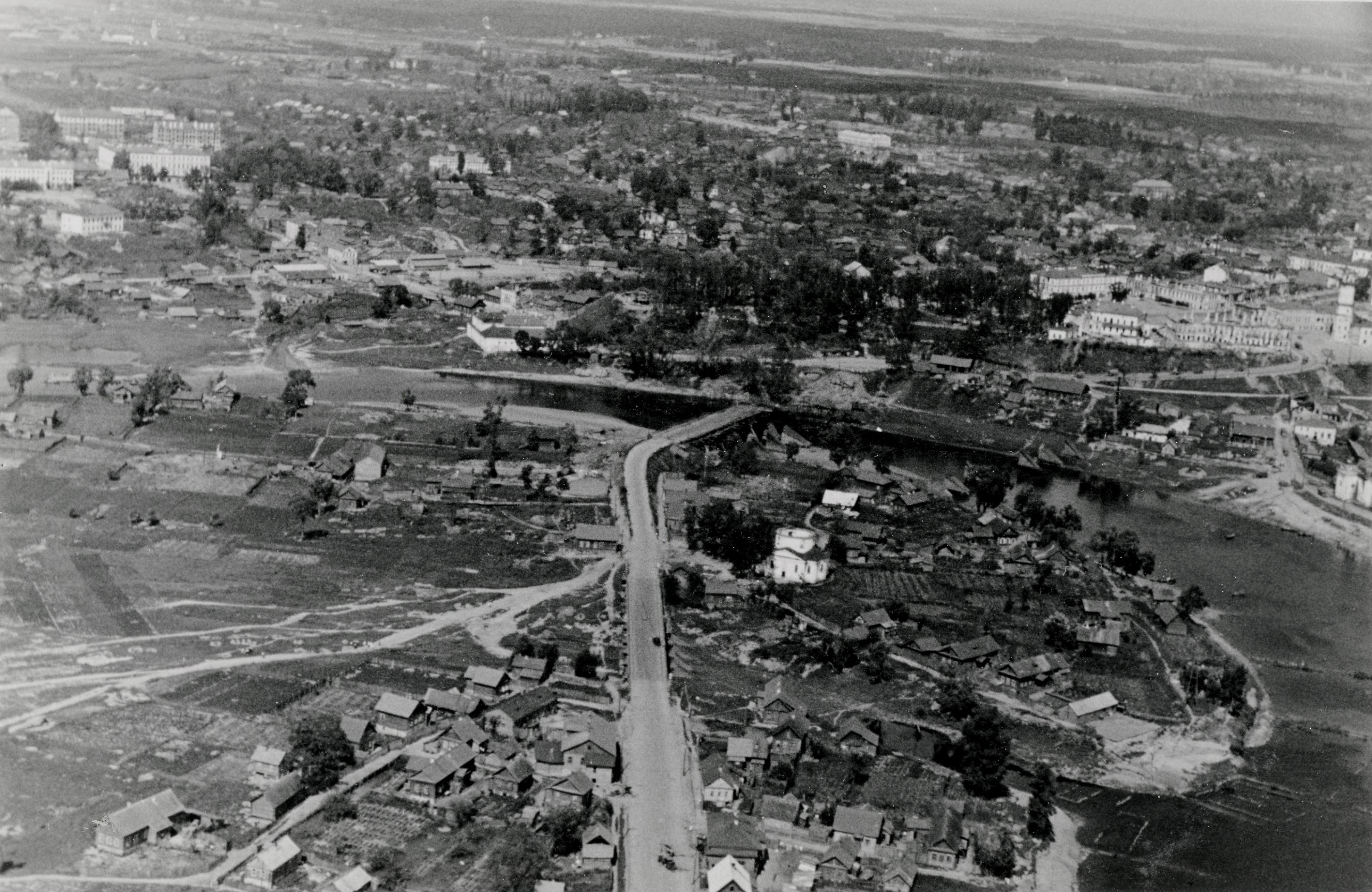 Беларуская (тарашкевіца): Магілёў (Mahiloŭ), Лупалава (Łupałava) і Траечча (Traječča). Аэрафотаздымак